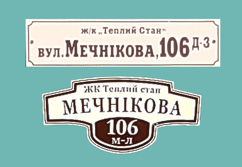 Нумерація будинків. Урочище Пилипів Потік. Ірпінь.